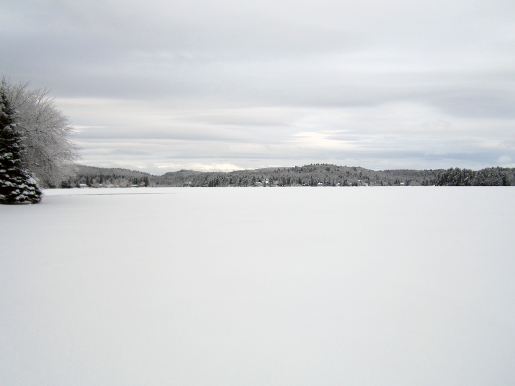 Lac des Français à la plage municipale de Ste-Marceline-de-Kildare